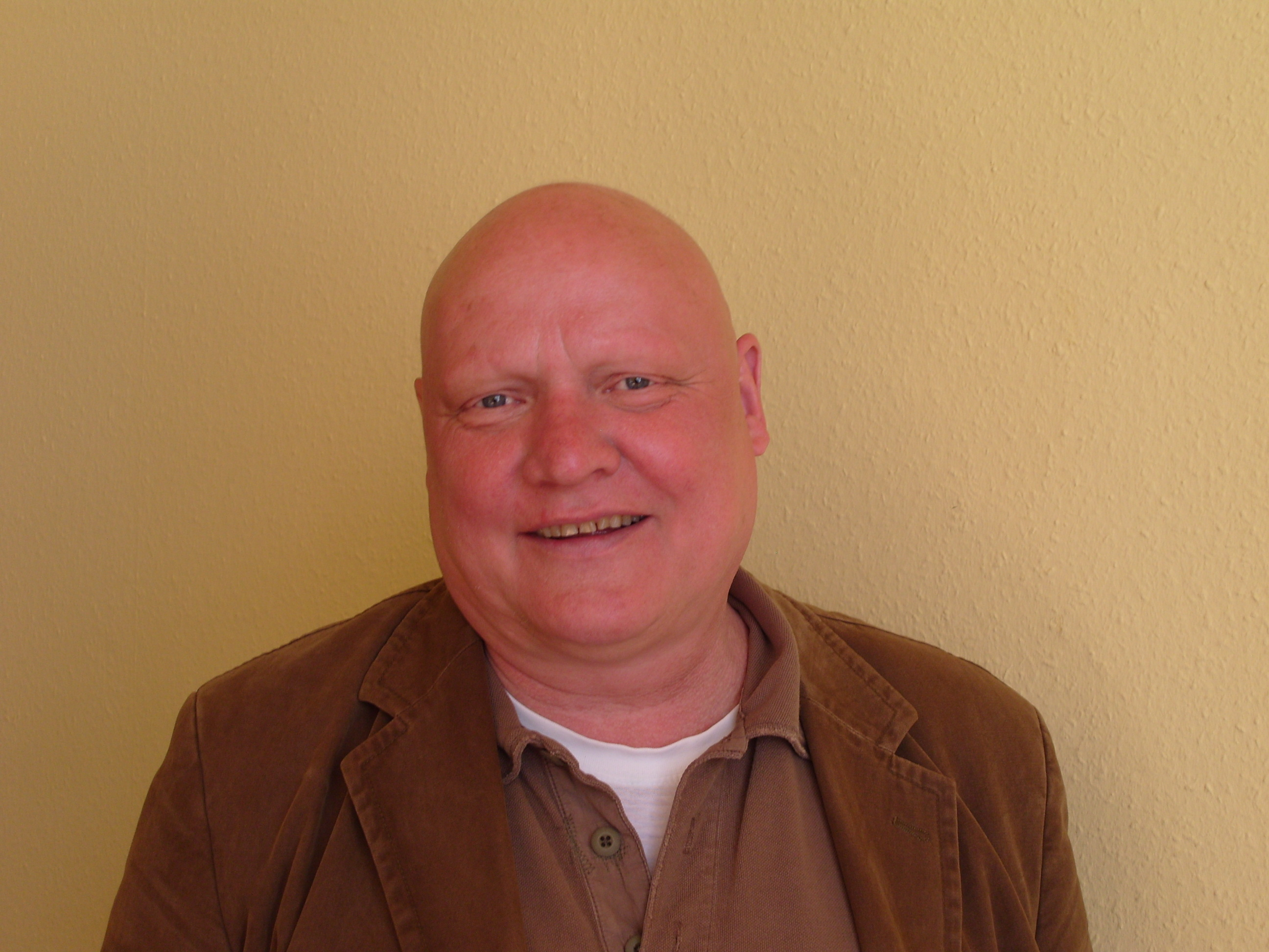 Detlef Bierstedt vor einer Synchronaufnahme in Berlin